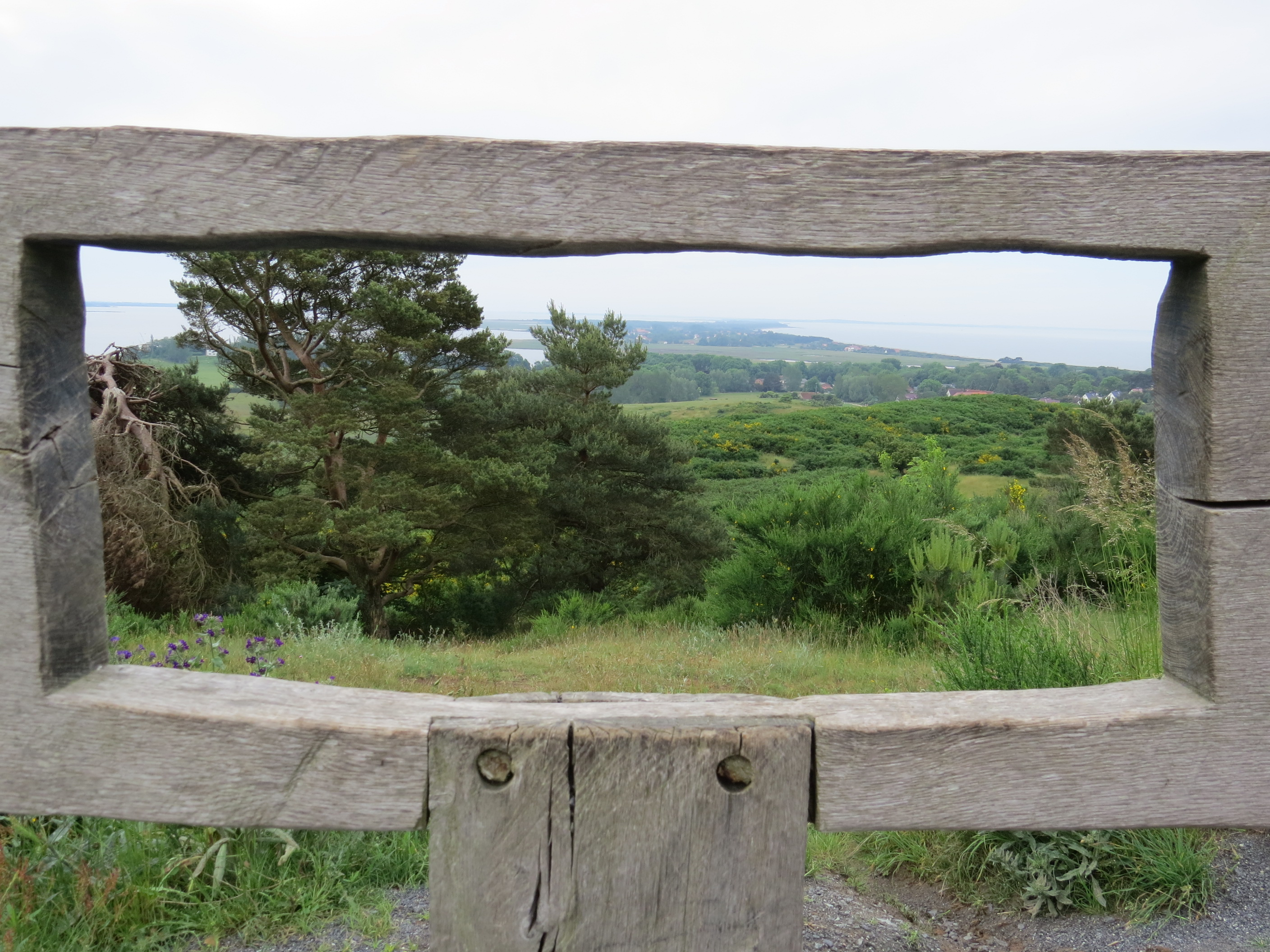 Hiddensee, Ort Kloster, "Inselblick", ama fec.jpg